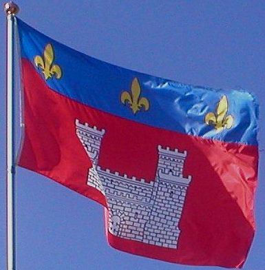 Drapeau au vent reprenant le blason de Châtillon-sur-Seine (France) Prise de vue personnelle août 2005 Siren 21 septembre 2005 à 15:52 (CEST)